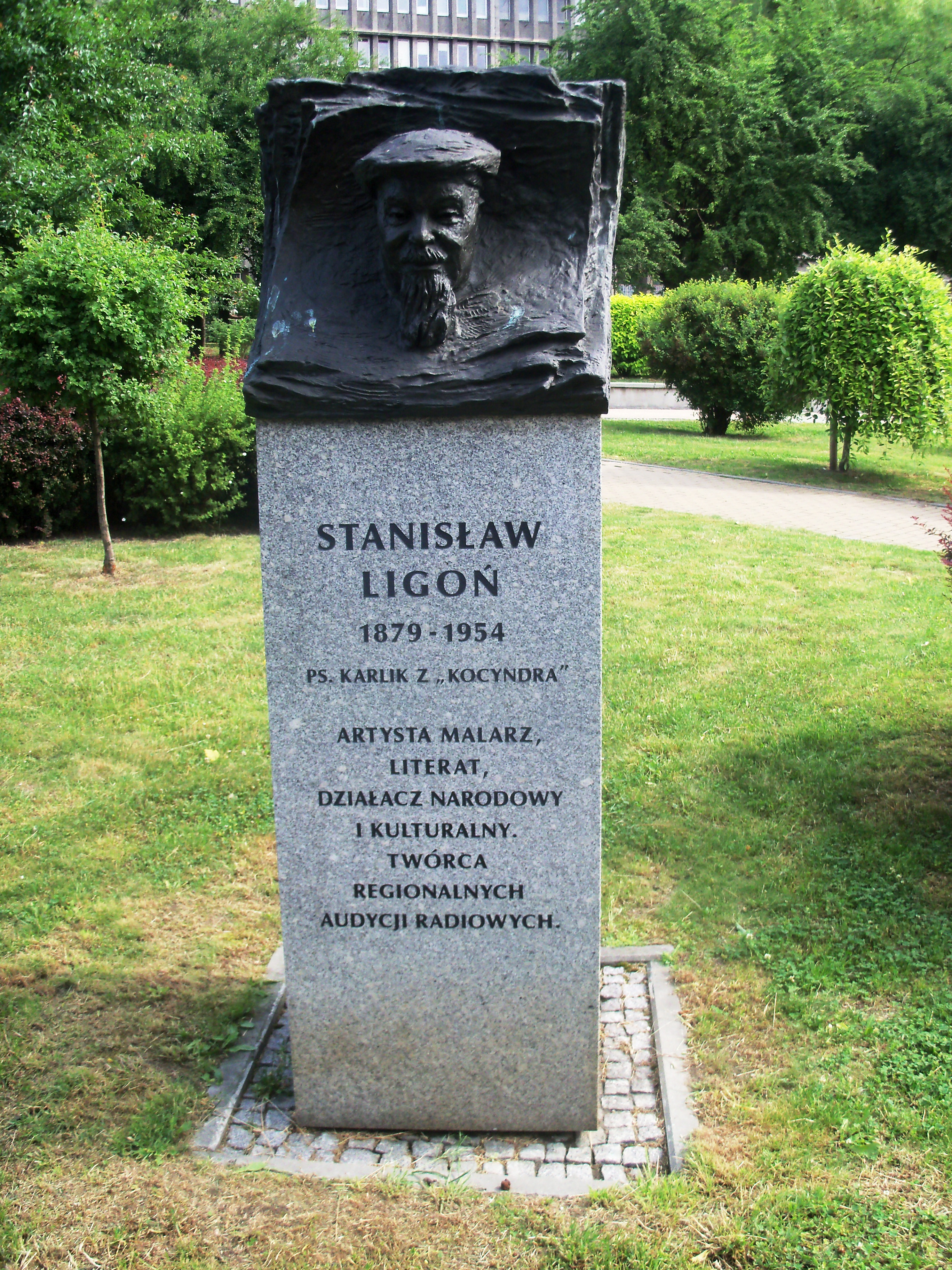 Galeria Artystyczna na placu Grunwaldzkim w Katowicach: Rzeźba przedstawiająca Stanisława Ligonia